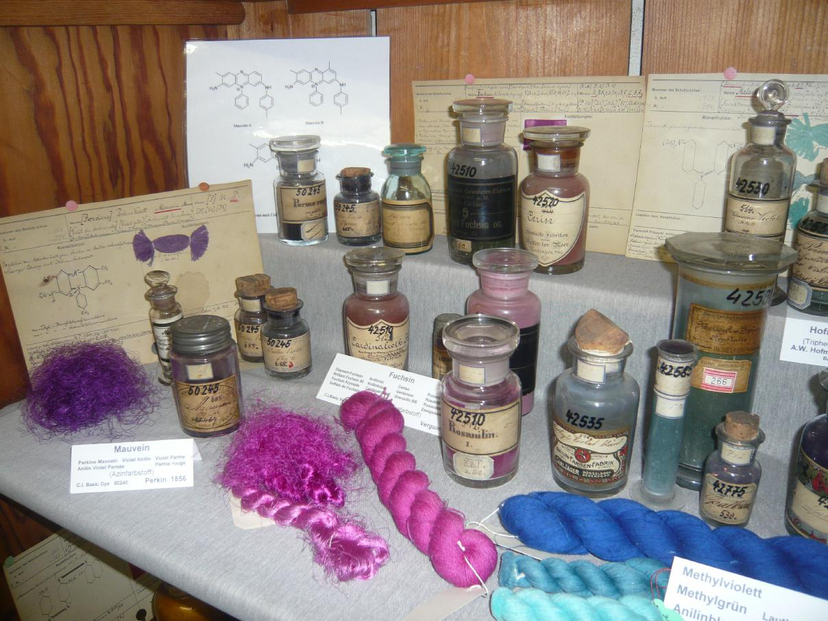 Mauvein, Fuchsin und Methylviolett ERSTE brauchbare Teerfarbstoffe (Historische Farbstoffsammlung der TU Dresden)